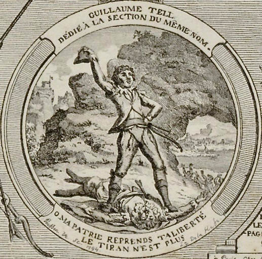 Jean-Baptiste Marie Poisson: Wilhelm Tell als Held der Französischen Revolution, der gleichnamigen Sektion von Paris gewidmet, Jahr 2 (1794). Radierung, graviert, 9 x 19,5 cm (Ausschnitt). Bibliothèque nationale de France. Übersetzung der Inschrift unten: "Oh mein Vaterland, erobere deine Freiheit zurück, der Tyrann ist nicht mehr!“